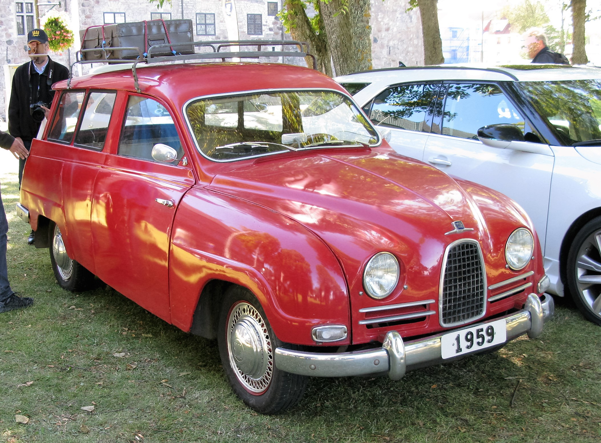 International Saab Meeting 2016.